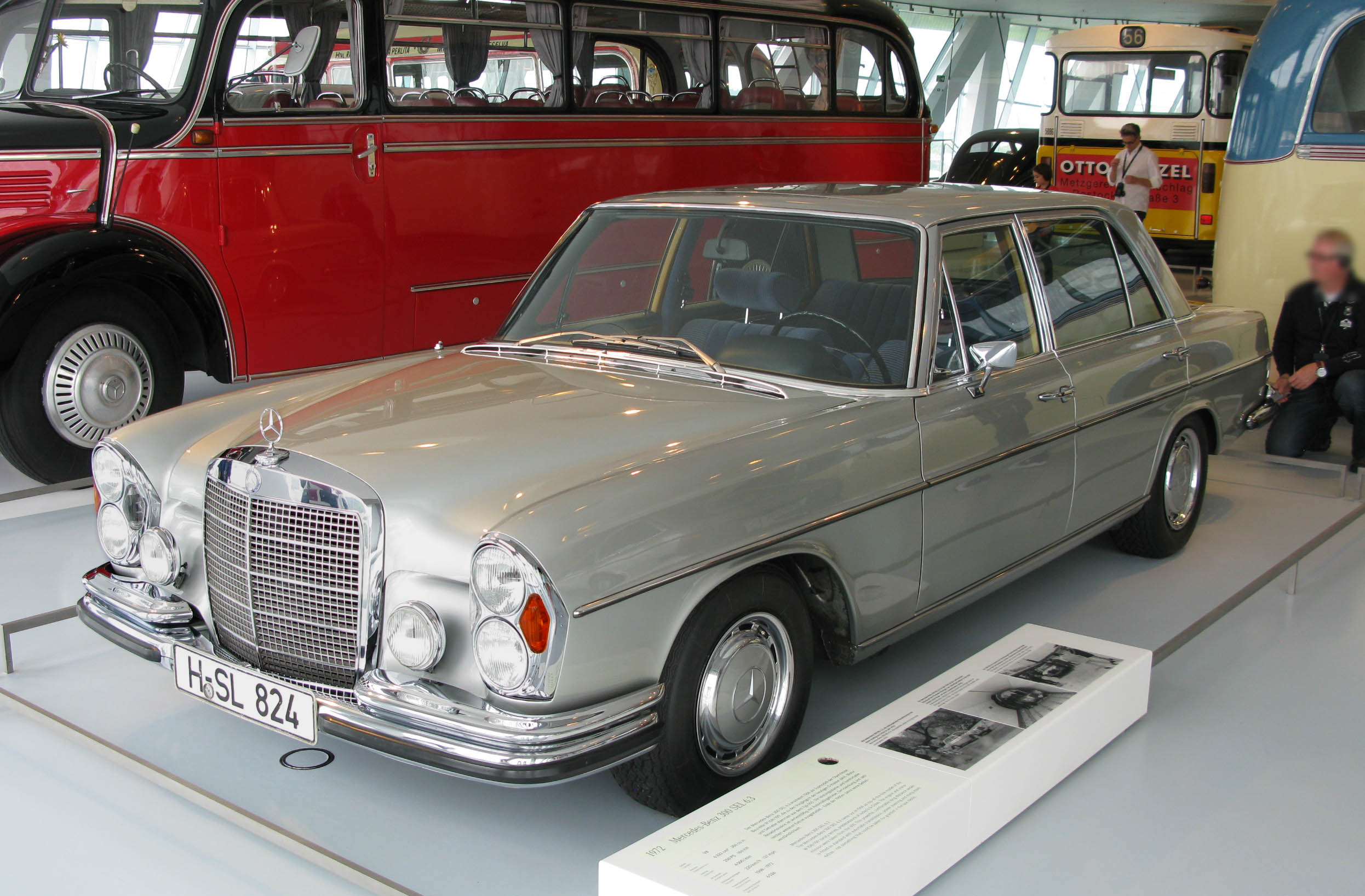 1972 Mercedes-Benz 300 SEL 6.3